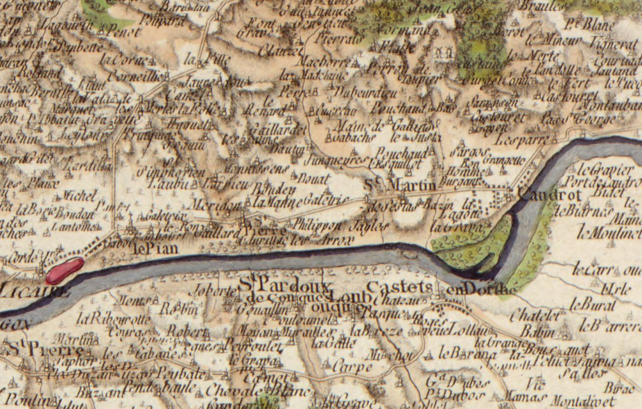 Cassini, feuille 105 : zoom sur Saint-Pierre-d'Aurillac